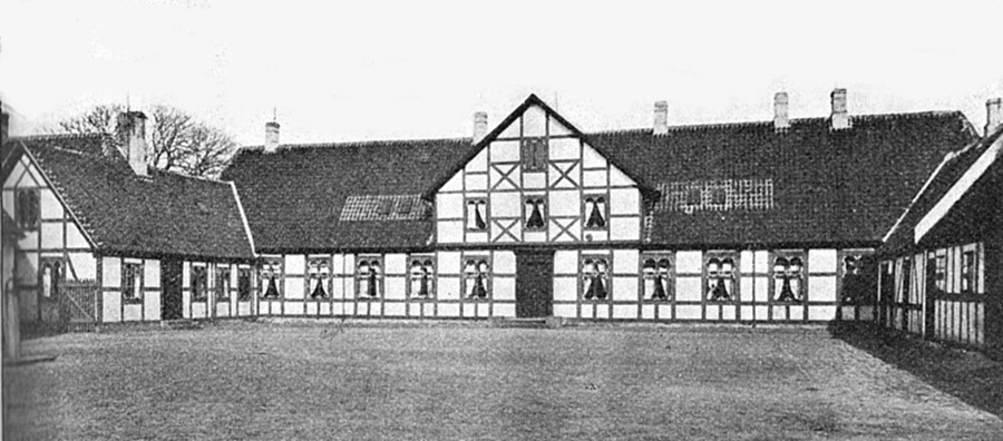 Kejrup er en gammel hovedgård, som nævnes første gang i 1385. Gården ligger i Kølstrup Sogn, Bjerge Herred, Kerteminde Kommune.